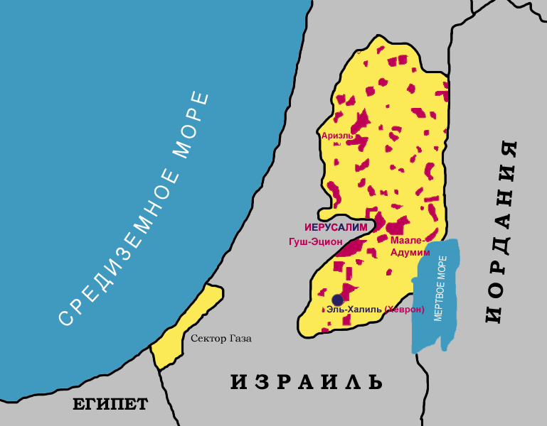 Еврейские поселения в Западном берегу реки Иордан (март, 2006)